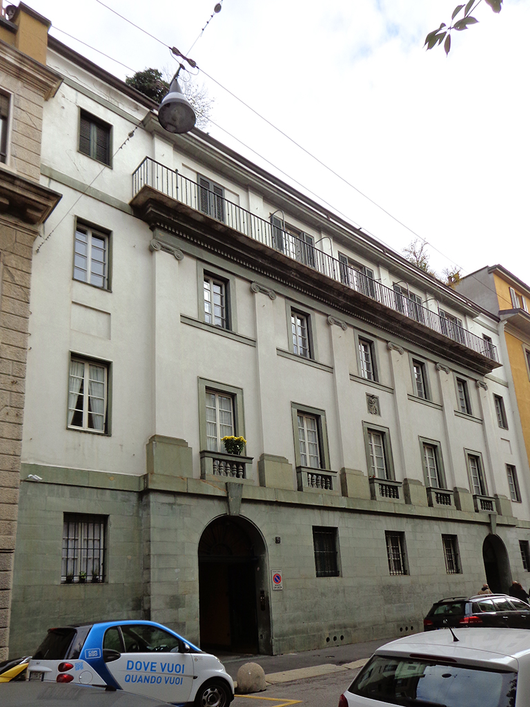 Milano, Casa Fiocchi in via Cernaia 6, costruita dal 1924 al 1925 su progetto di Mino Fiocchi in stile “Novecento”.Fonte: Maurizio Boriani, Corinna Morandi, Augusto Rossari, Milano contemporanea. Itinerari di architettura e di urbanistica, Maggioli Editore, 2007, p. 137. ISBN 978-88387-4147-6 Invalid ISBN.